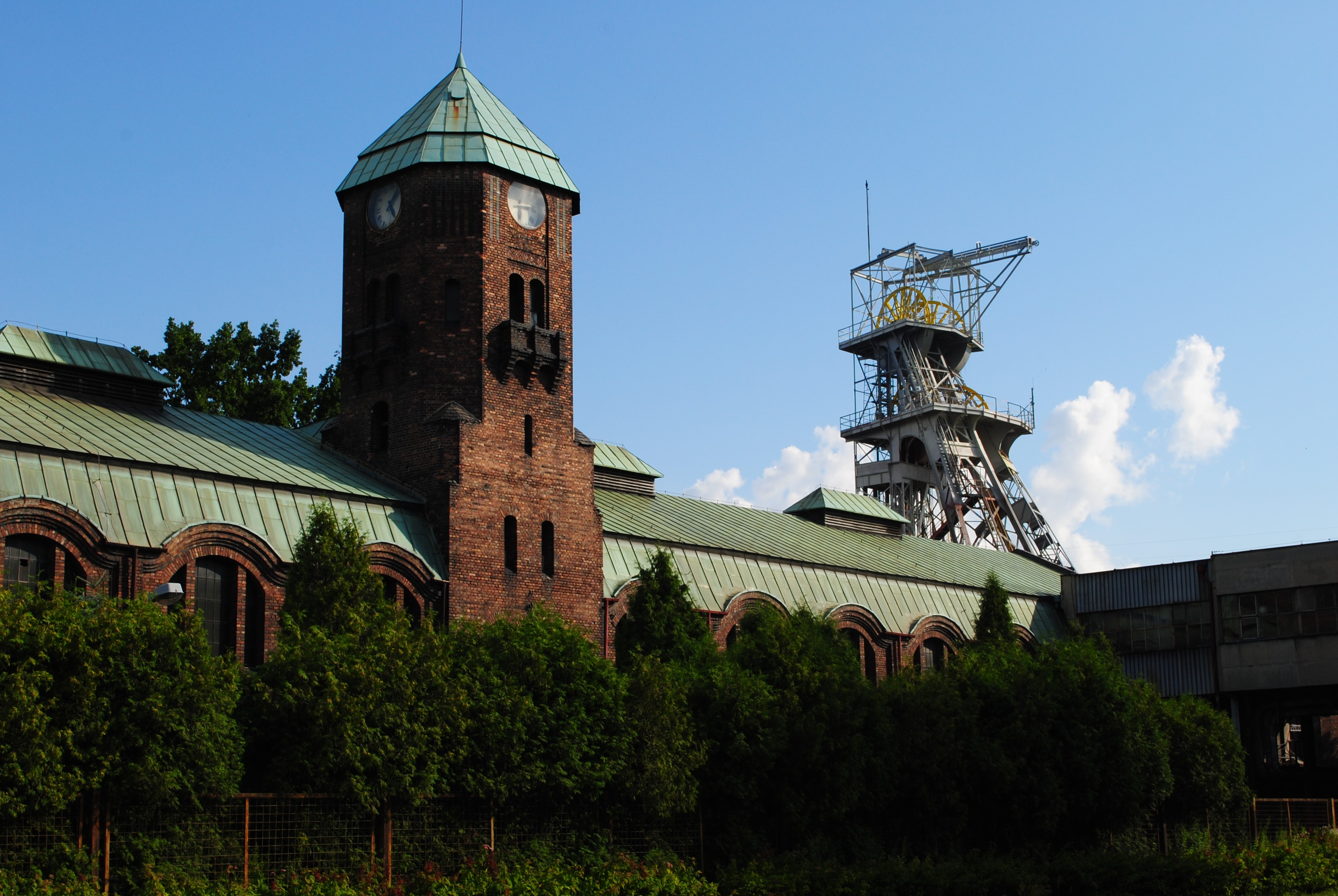 Katowice - Janów-Nikiszowiec. KWK Wieczorek. Szyb Pułaski